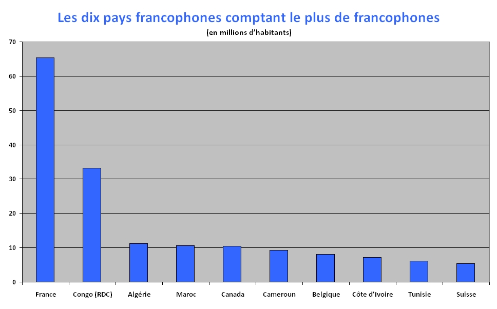 Les dix pays francophones comptant le plus de francophones au 1er juillet 2015 selon les estimations de l'OIF.